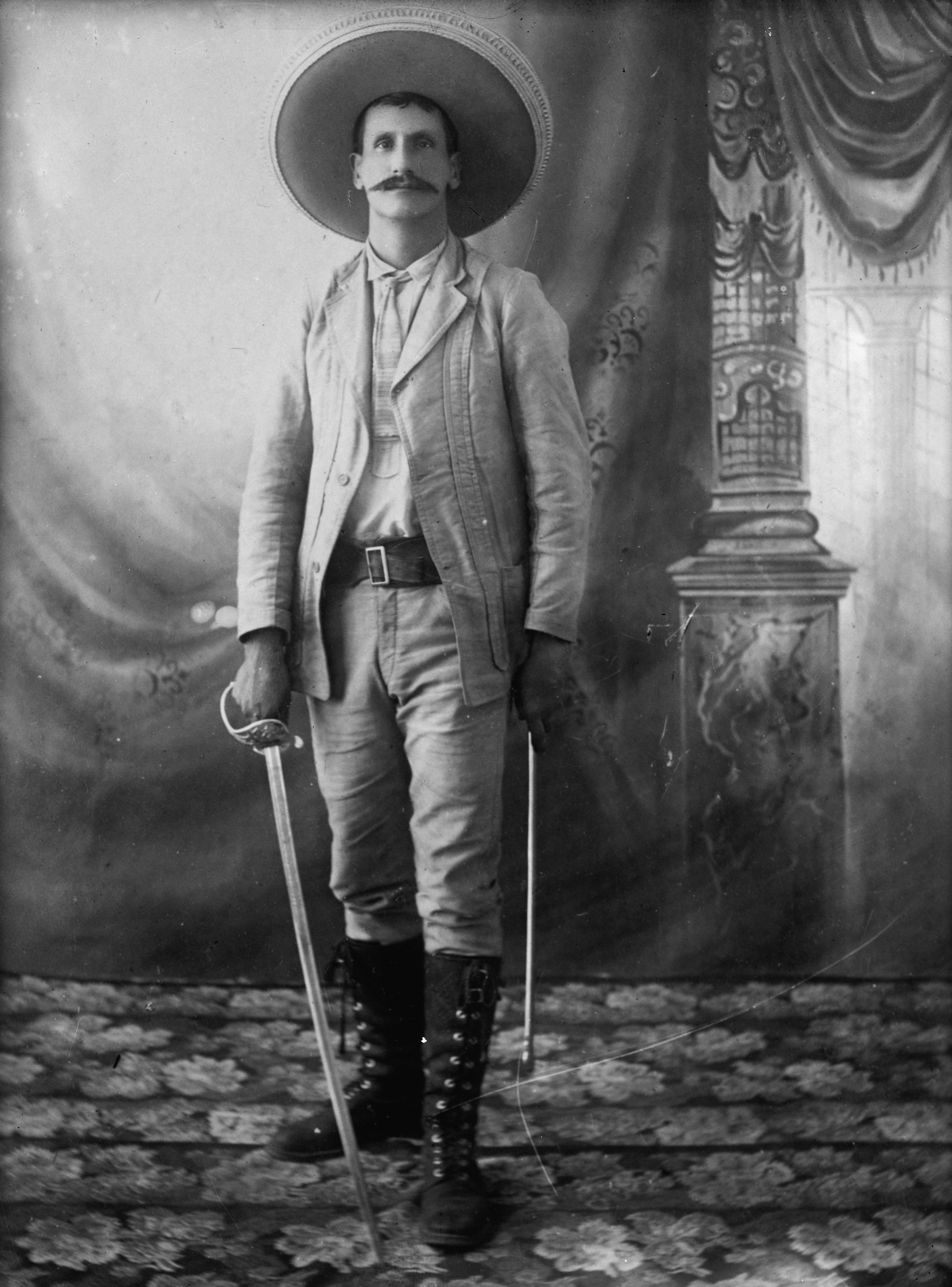 General Domingo Arrieta